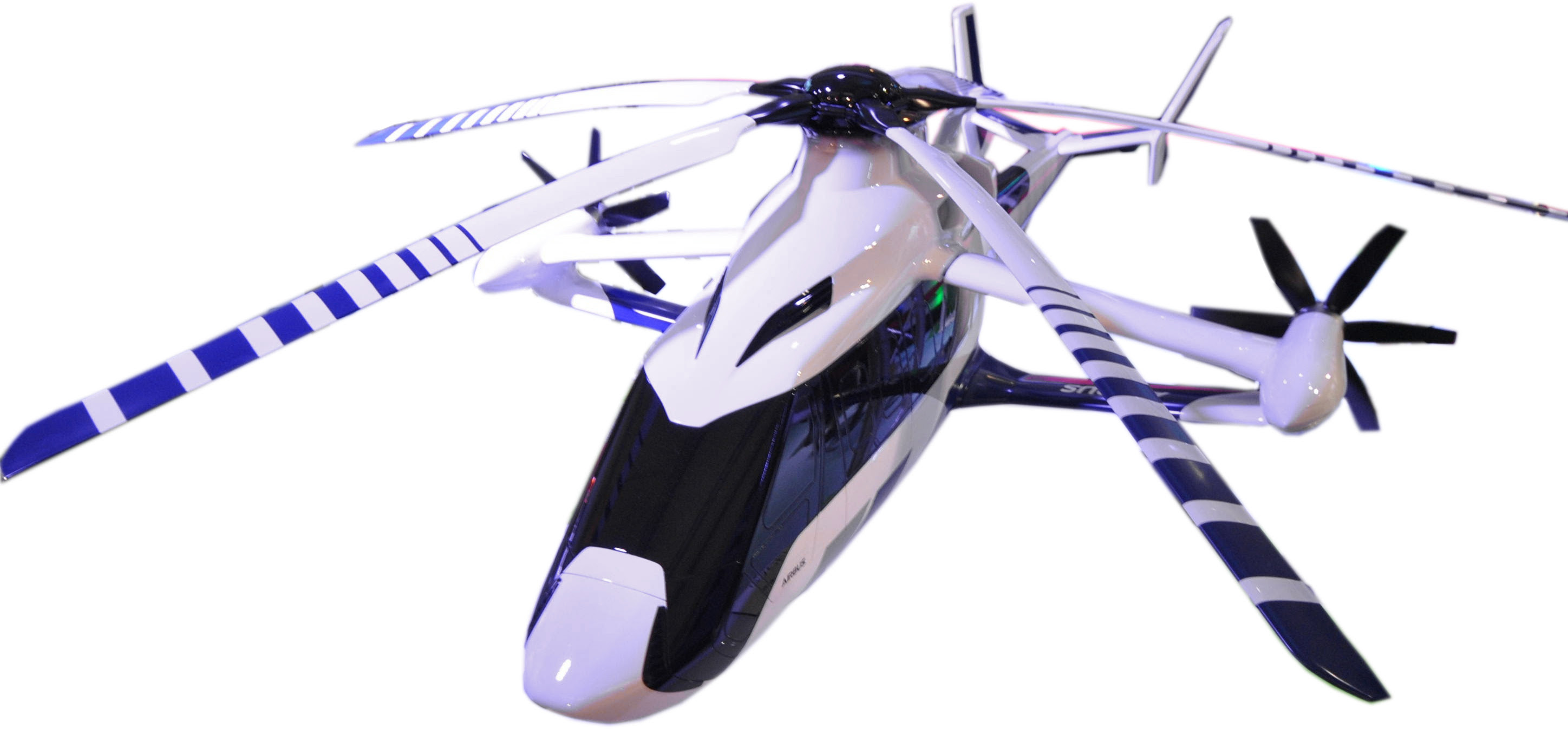 Paris Air Show 2017 Airbus racer